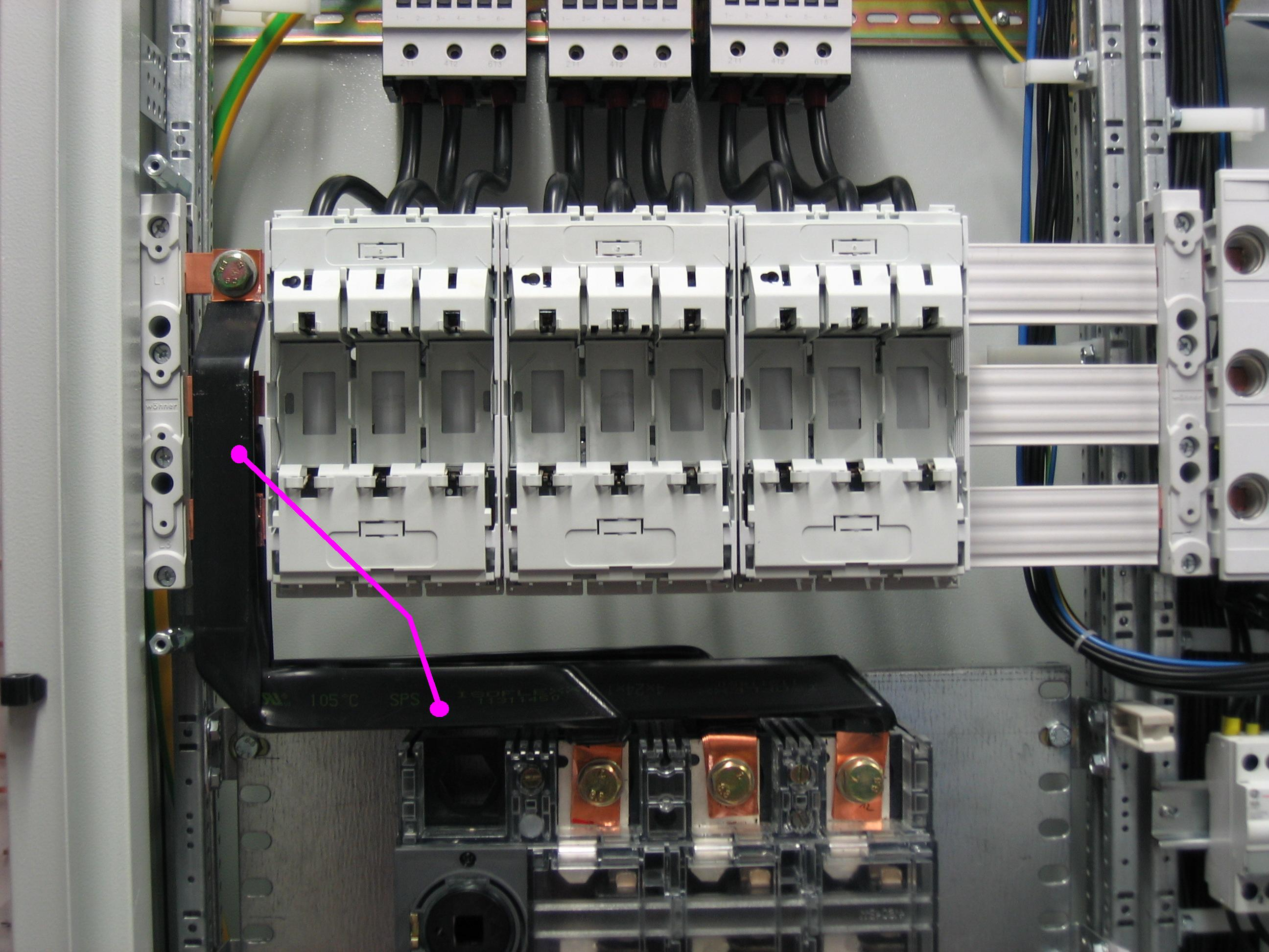 isolierte, lamellierte Stromschinen in einem Schaltschrank